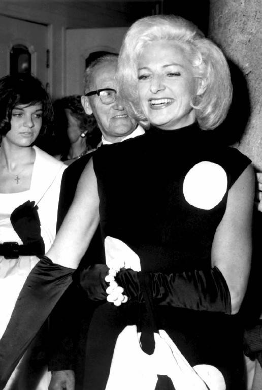 Alice Timander på premiär på Oscars 1961.